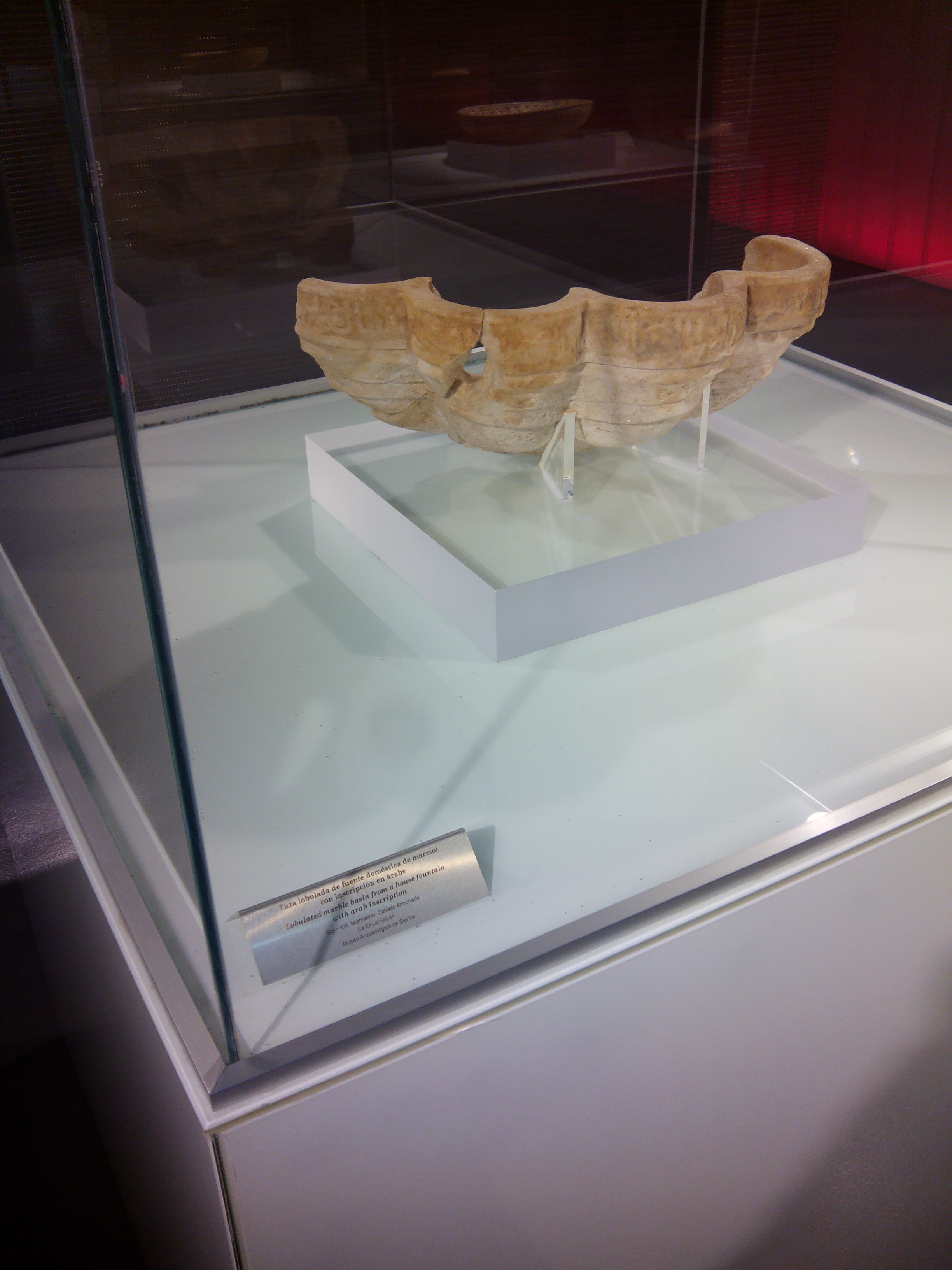 Taza lobulada de fuente doméstica de mármol con inscripción en árabe. Siglo XIII. Islamismo. Califato almohade.